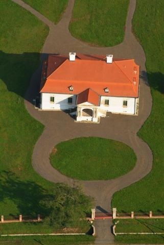 Komlódtótfalu, Hungary, aerial photography